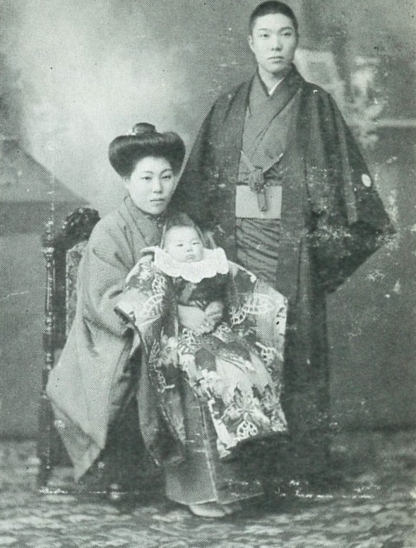 明治43年ごろに撮影。宮崎郁雨と妻のふき子、長女の孝子